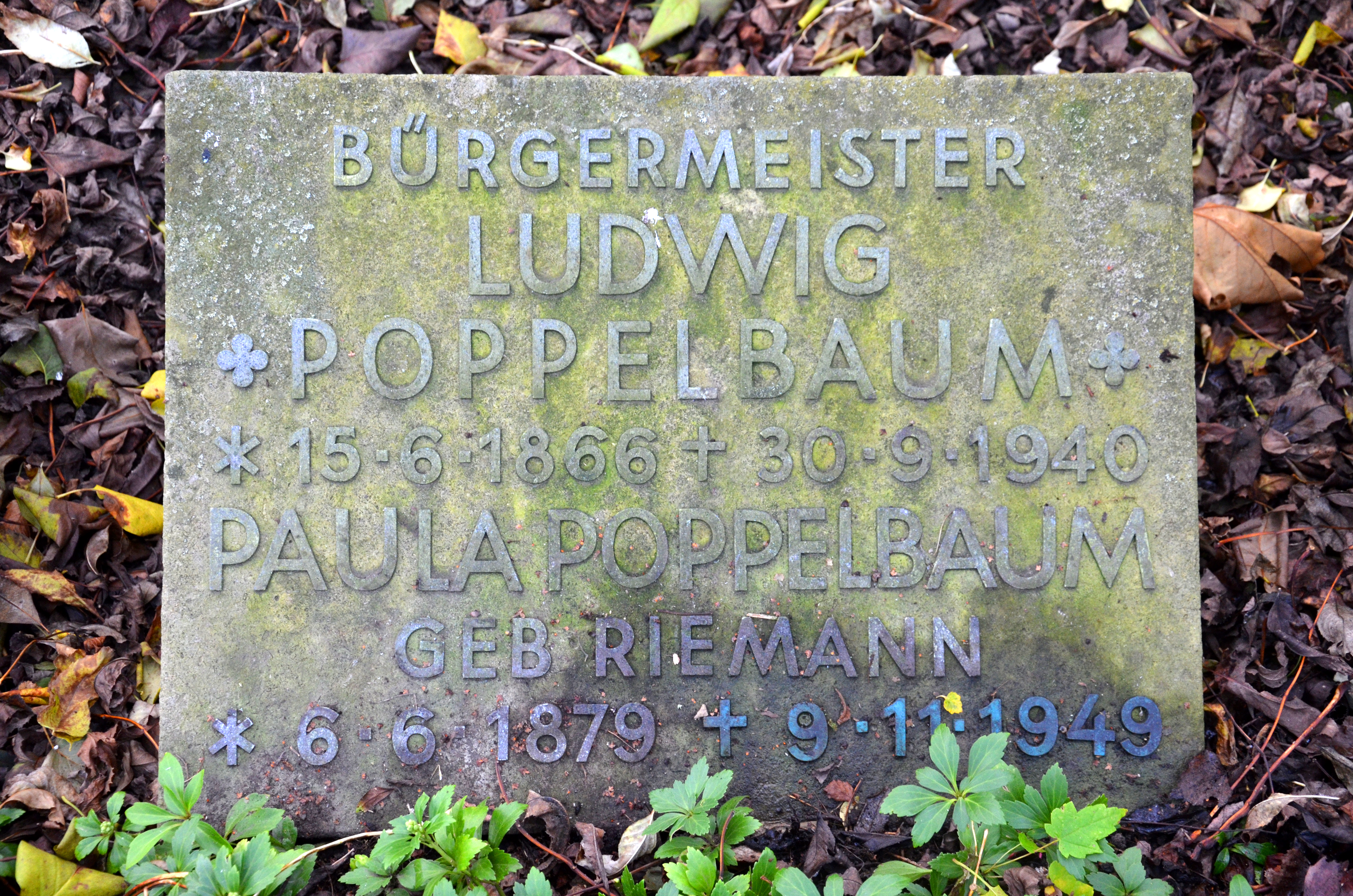 Schlichte Grabplatte auf dem Lindener Bergfriedhof für den Weseler Bürgermeister und Ehrenbürger Ludwig Poppelbaum und seine mutmaßliche Ehefrau Paula, geborene Riemann' (1879-1949) ...